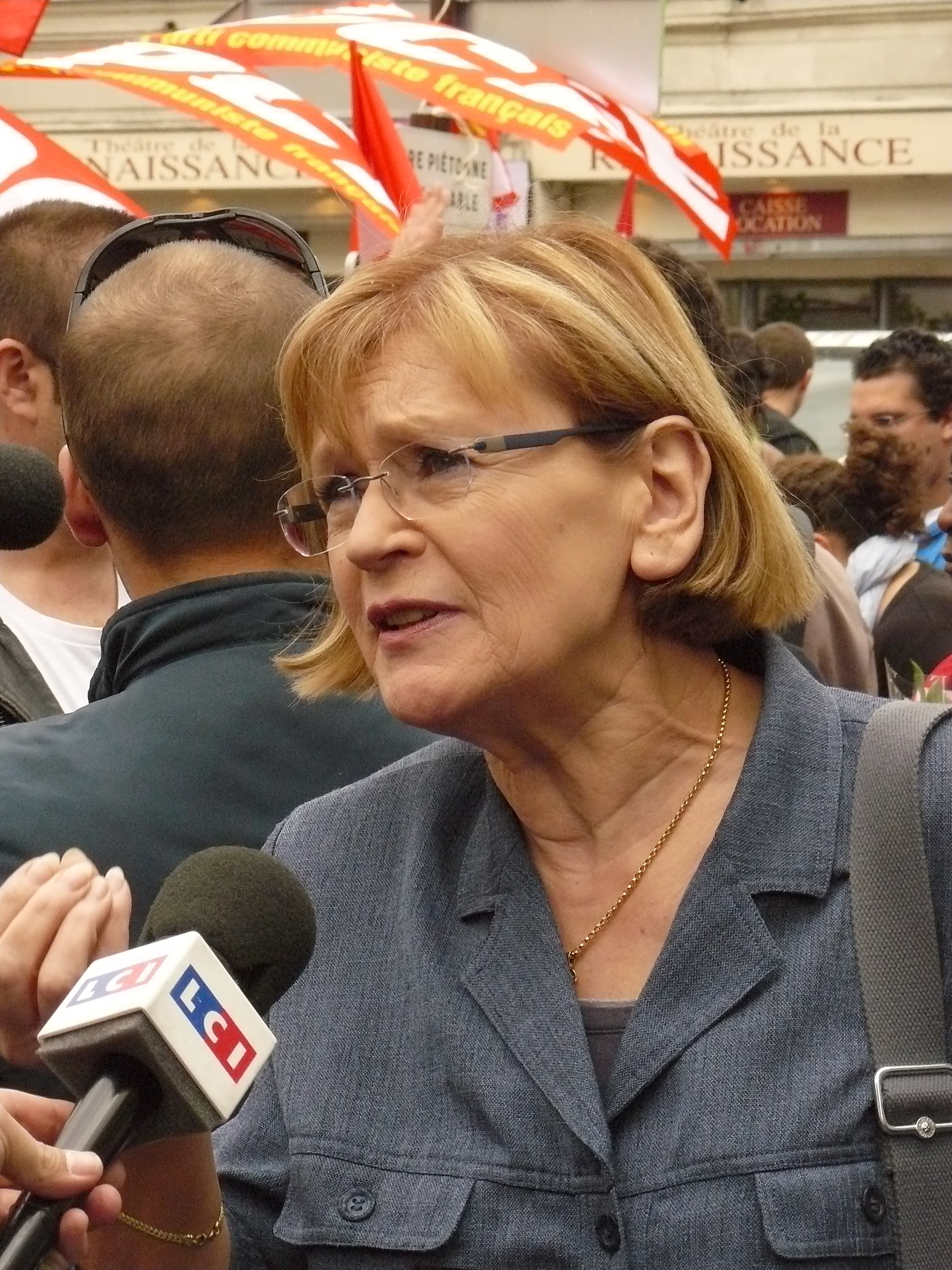 Marie-Georges Buffet, secrétaire nationale du Parti Communiste Français, lors de la manifestation du 1er mai 2010 à Paris.